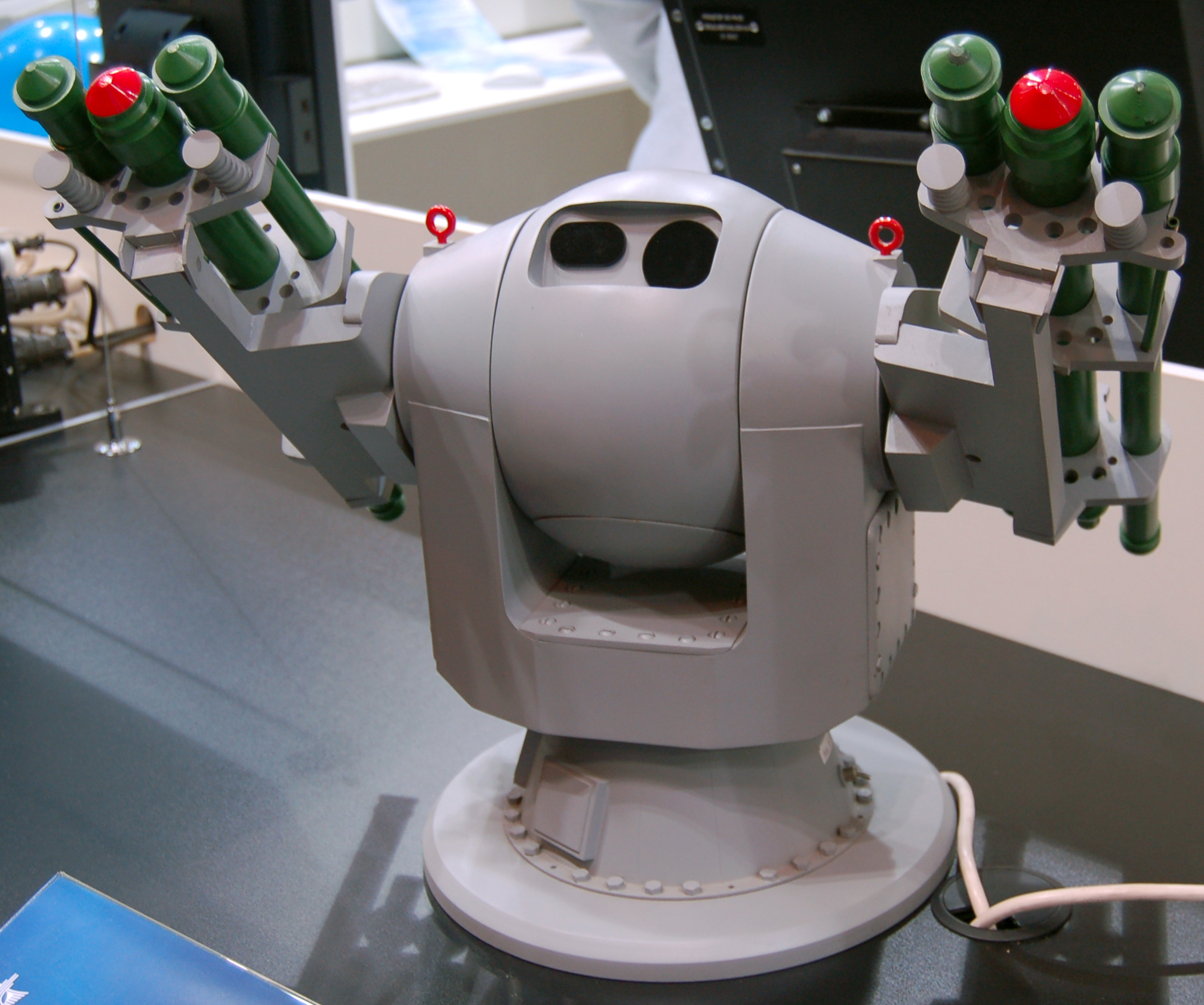 Макет пусковой установки 3М-47 "Гибка" на МАКС-2009